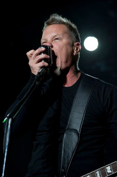 James Hetfield en Mexico